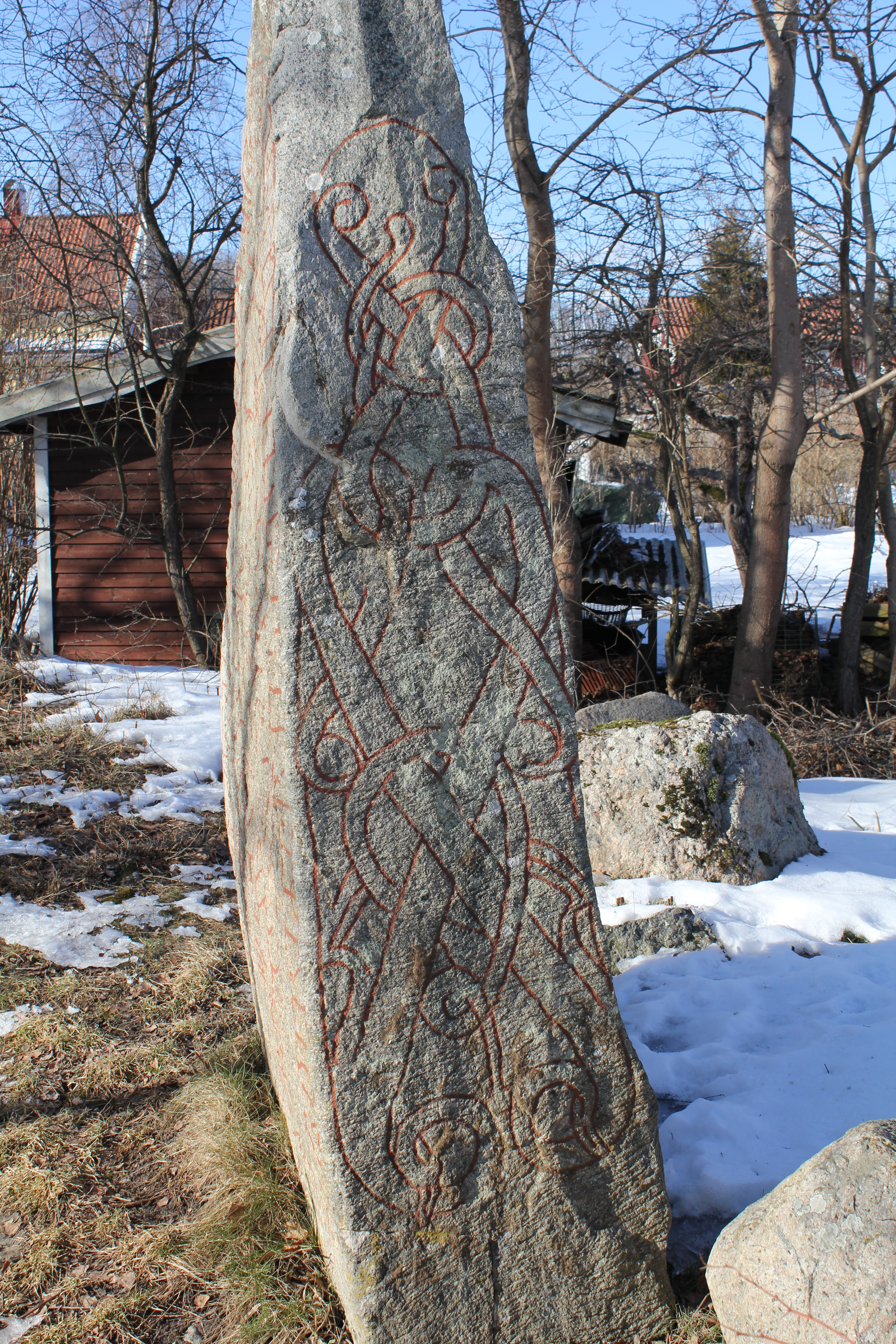 Runstenen U 60 i Norra Ängby, Bromma. Ristningen på sidan.